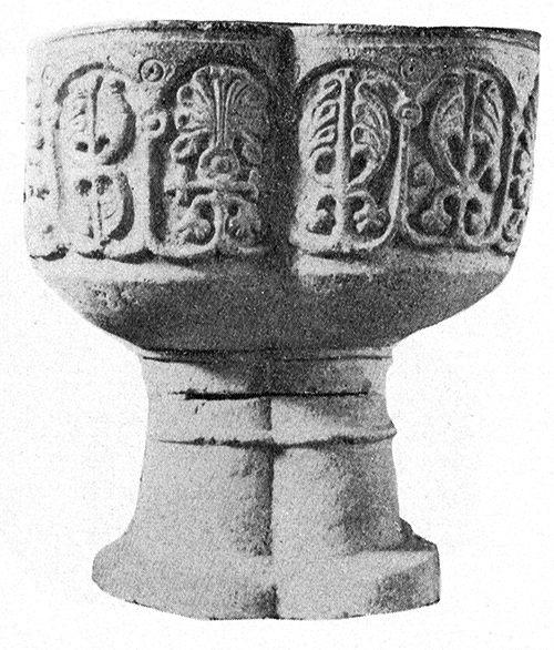 Horreds kyrka. Dopfunt